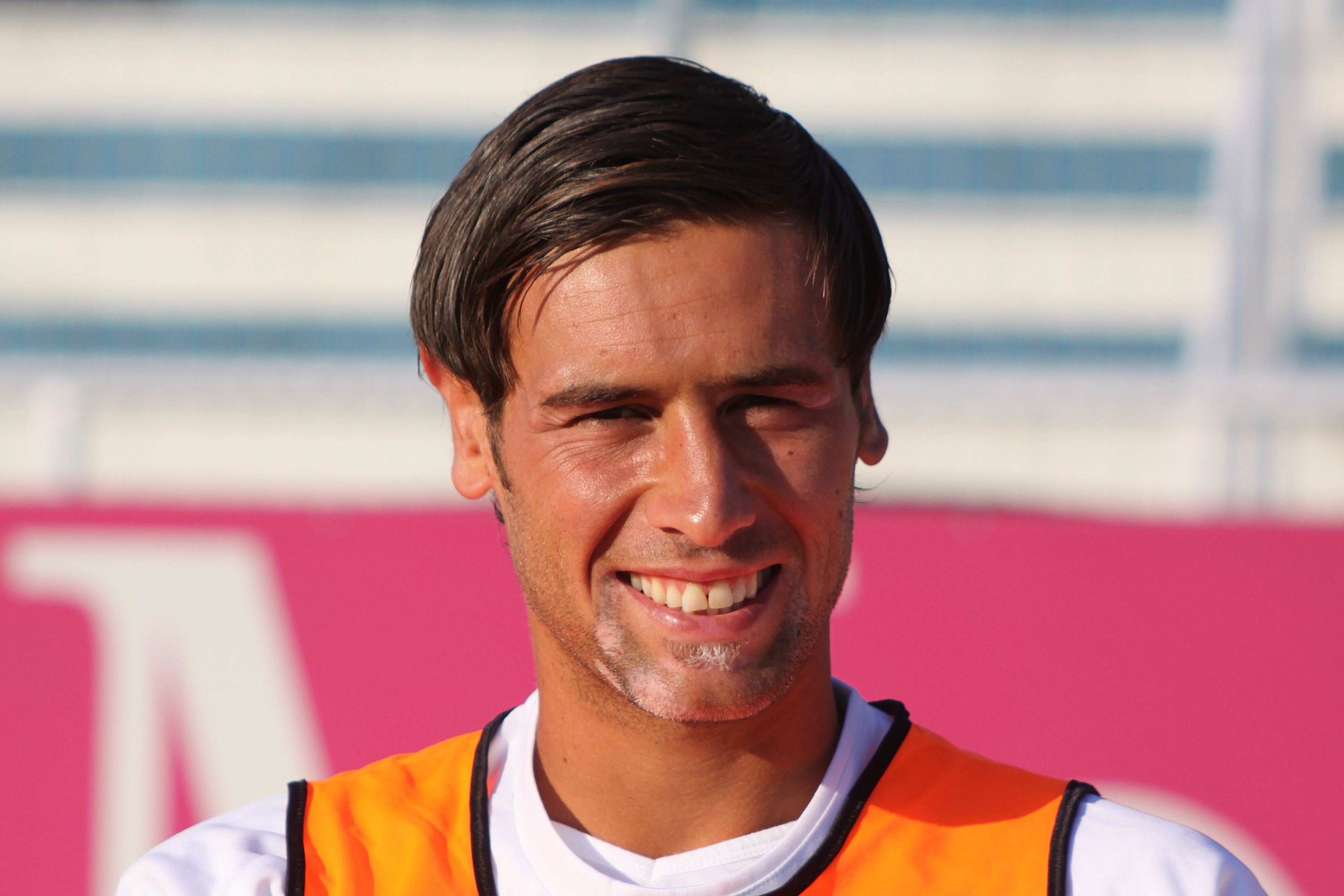 Leandro Rinaudo - SSC Neapel (2) Leandro Rinaudo - Società Sportiva Calcio Napoli